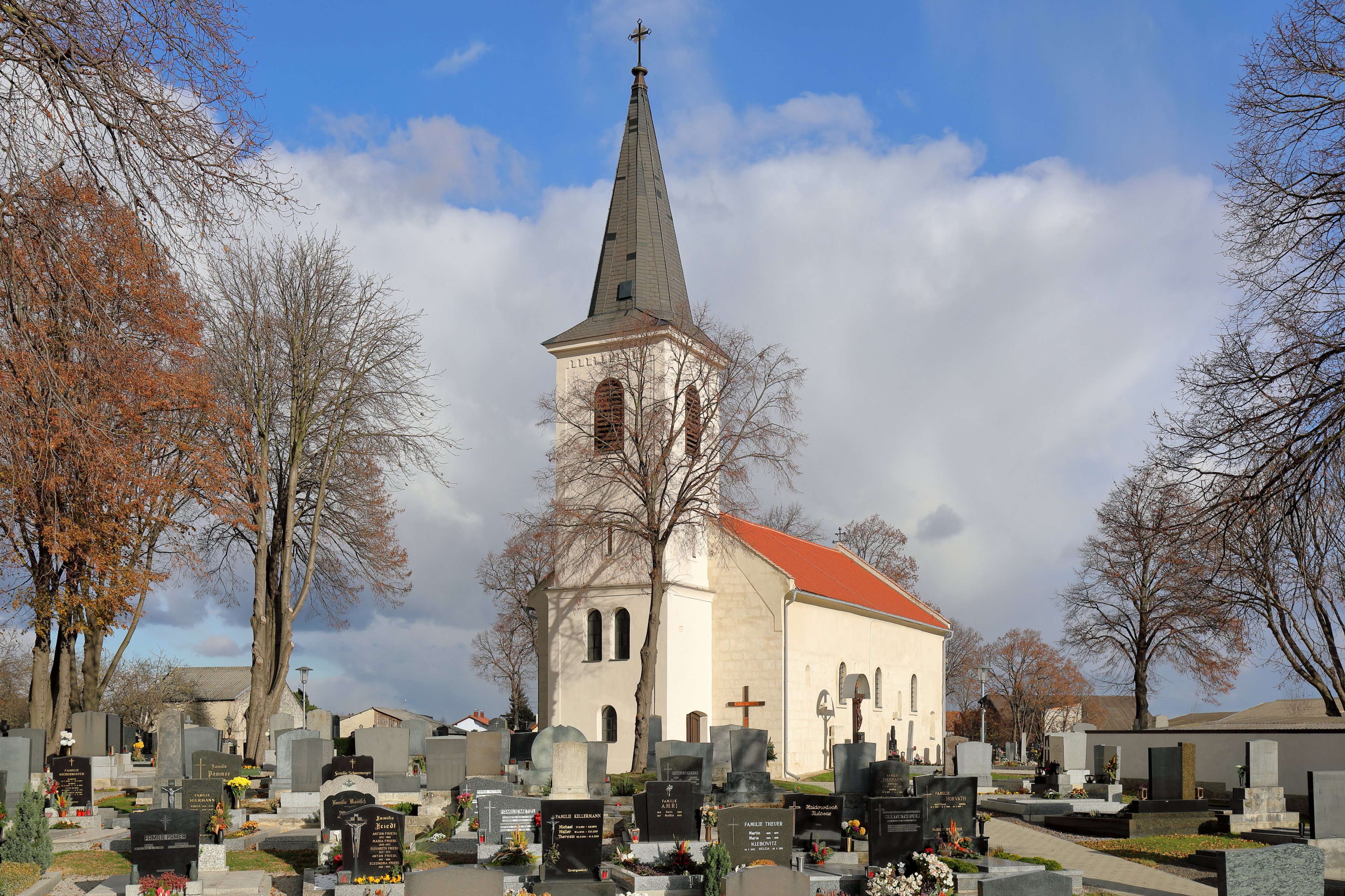 Südwestansicht der röm.-kath. Pfarrkirche Hll. Petrus und Paulus in der burgenländischen Marktgemeinde Zurndorf.Eine im Kern romanische-frühgotische Saalkirche in erhöhter Lage, die von einem Friedhof umgeben ist. Der zweigeschossige, vorgestellte West wurde nach einem Brand 1857 wiederinstandgesetzt bzw. neu errichtet.